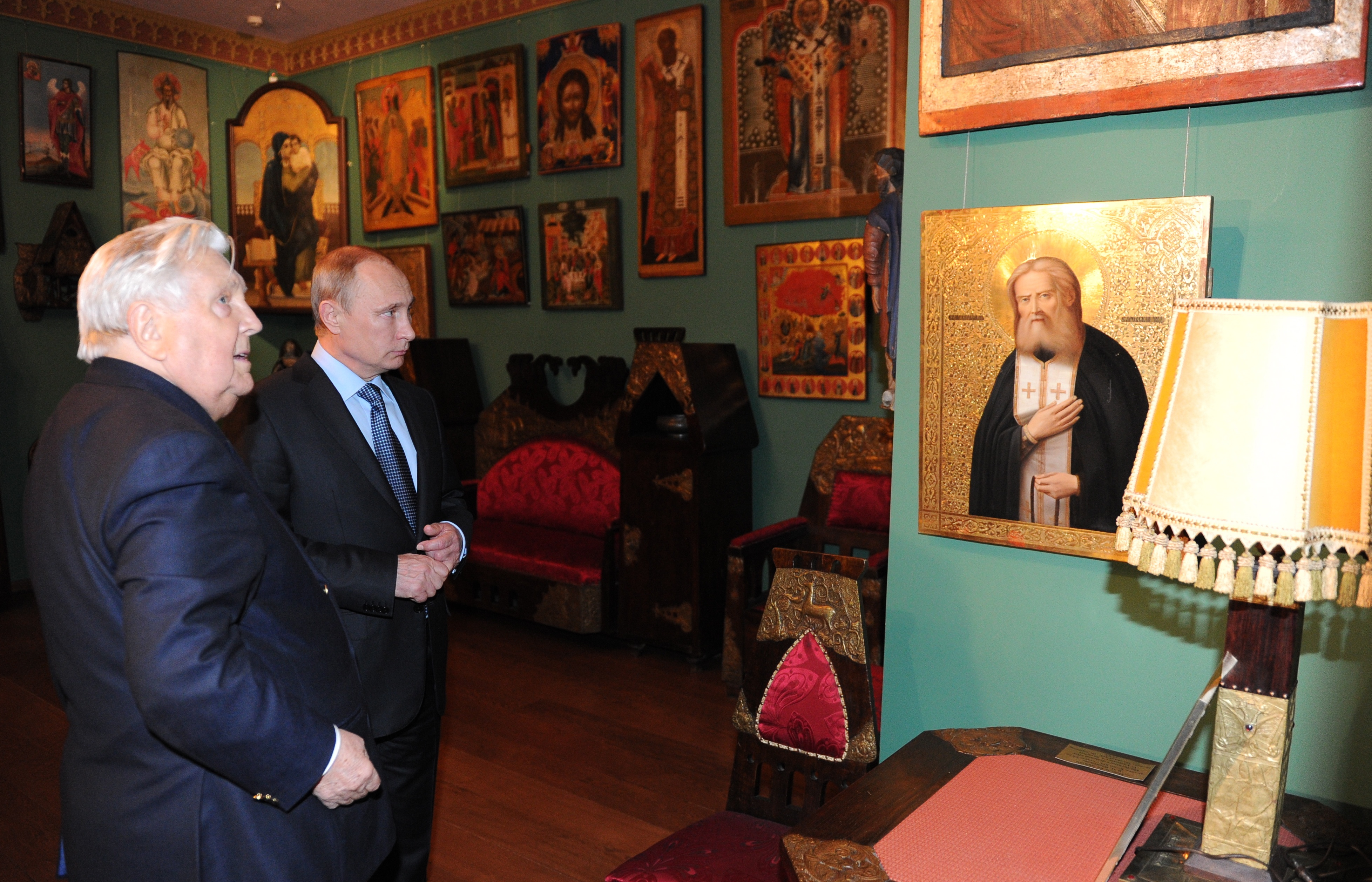 Владимир Путин во время посещения Музея сословий России. С народным художником СССР Ильёй Глазуновым